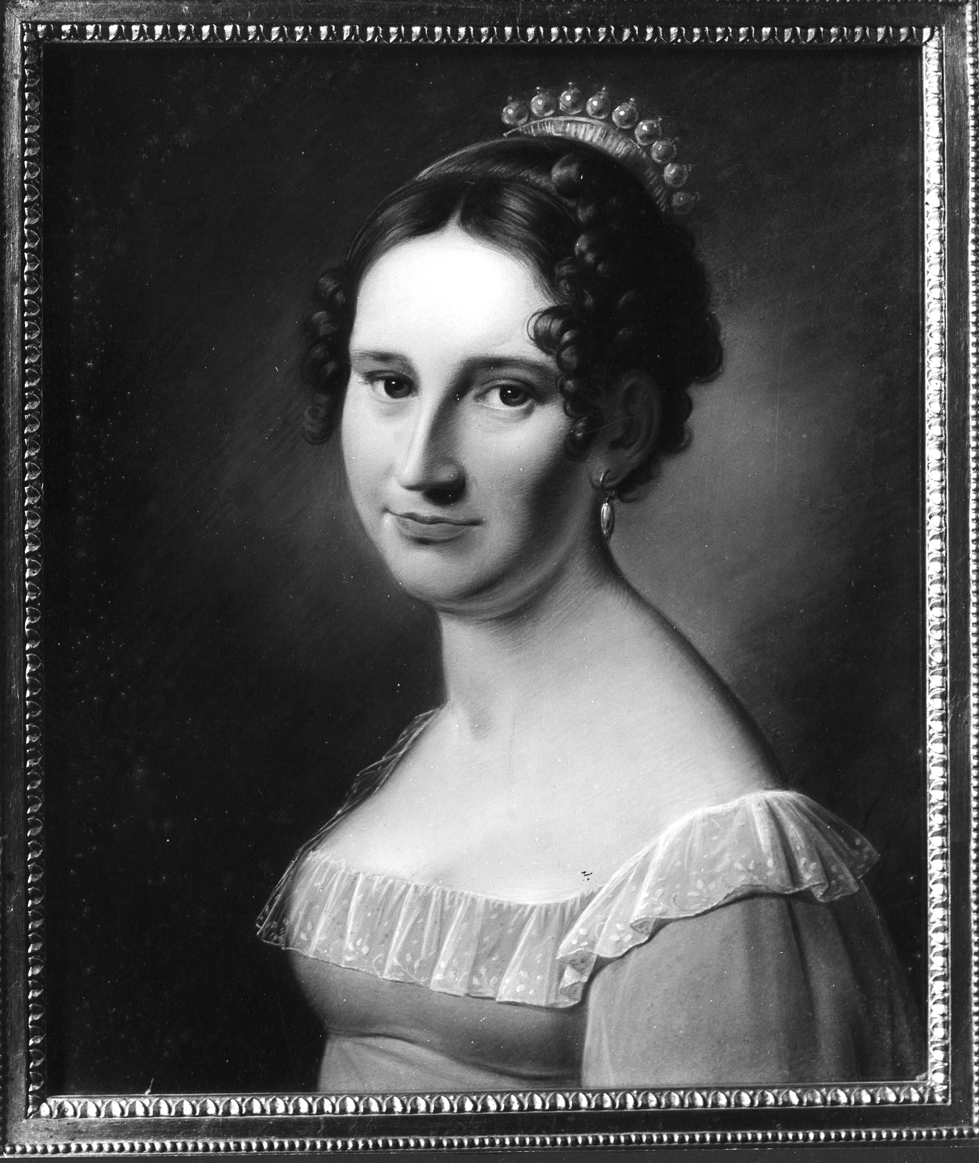 Sophie Hedevig komtesse Knuth, gift Løvenskiold, avfotografering av maleri av Christian Horneman